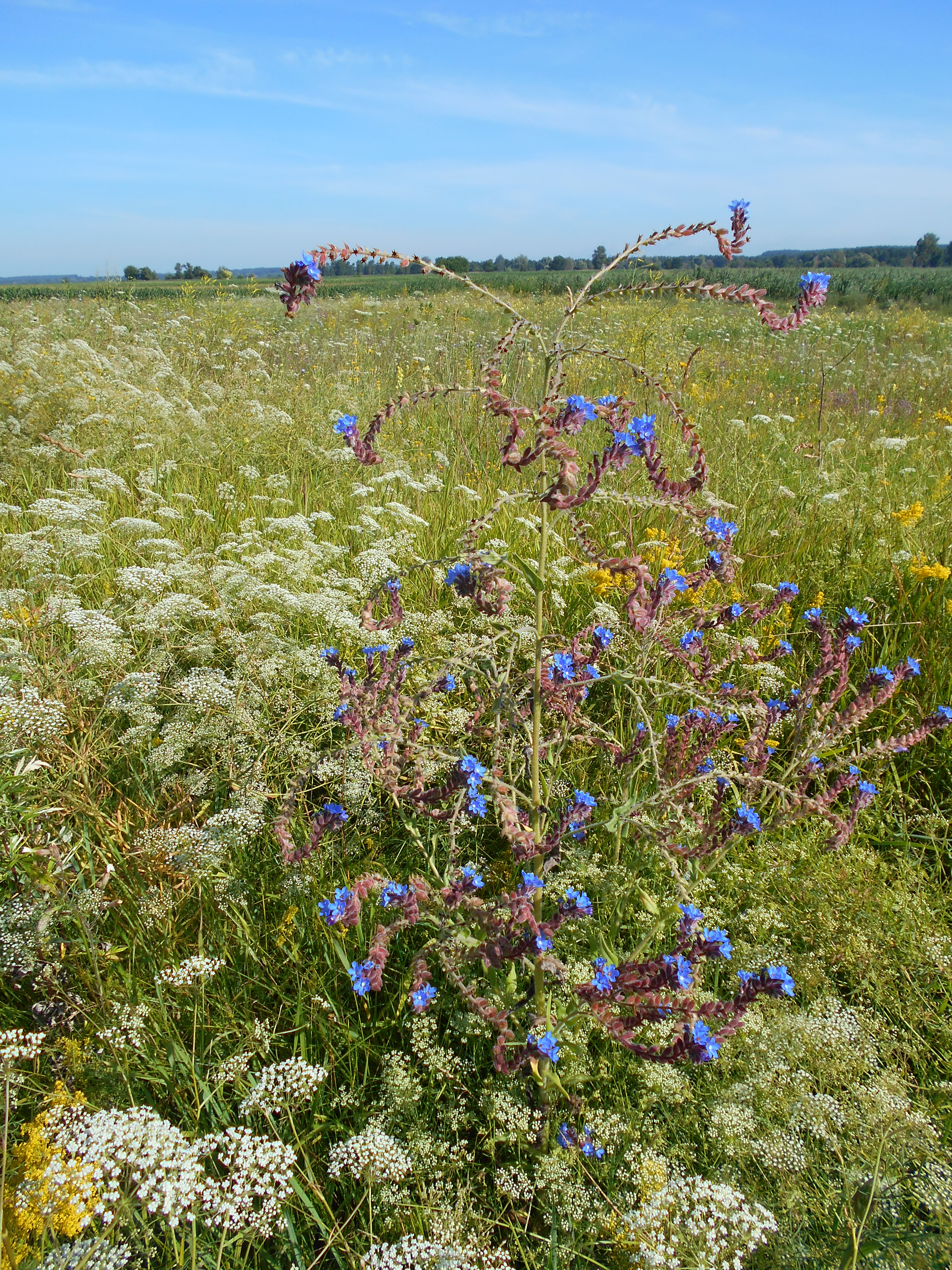 Smilyans'kyi district, Cherkas'ka oblast, Ukraine